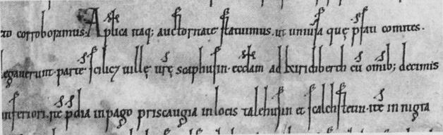 Ausschnitt aus einem Schutzbrief von Papst Urban II an das Kloster Allerheiligen (Schaffhausen). Es enthält die erste Nennung der Bergirche Büsingen (ecclesiam ad Kirichberch).